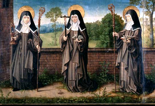 Medeltida altartavla från Danvikens hospital. Ursprungligen fanns målningen troligtvis i Klara kloster. Klara bär på lampa, Hortolana bär ett litet kors och Agnes av Assisi bär en bok.